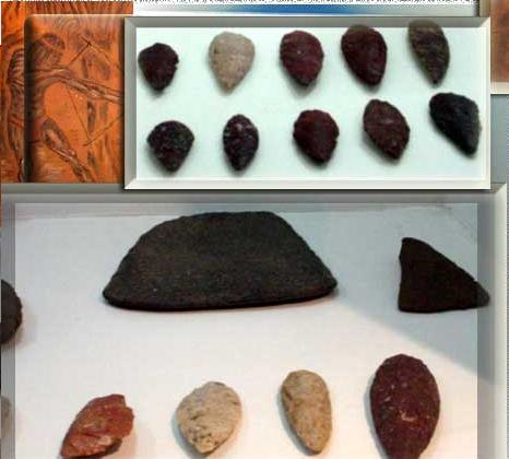 Piezas Arqueologicas Precolombinas